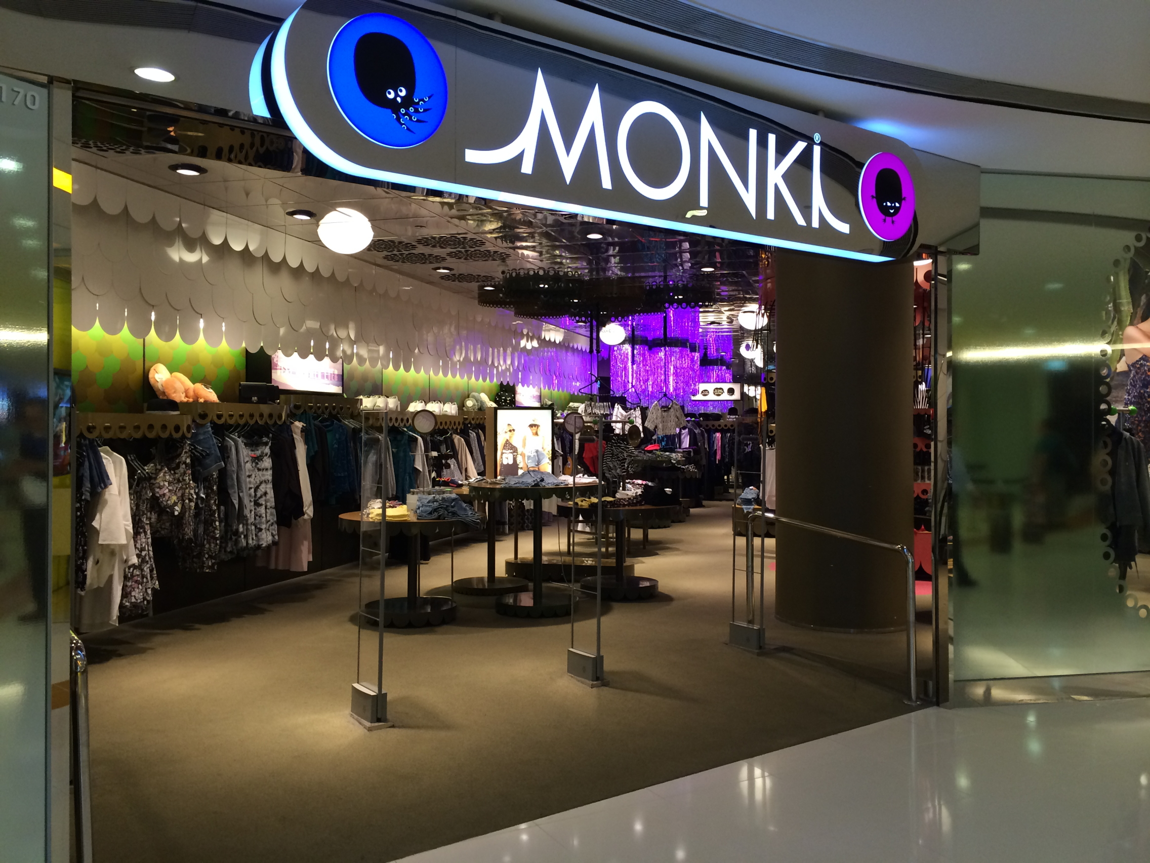 Monki in Tsuen Wan Plaza